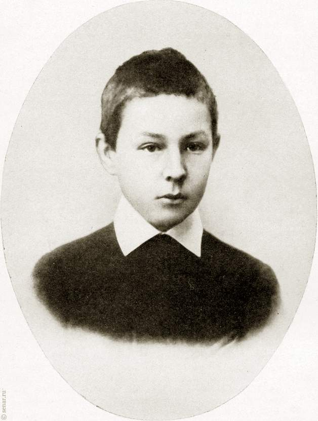 Sergei Rachmaninoff